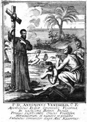 Riproduzione di illustrazione a stampa di opera a stampa dell'anno 1758